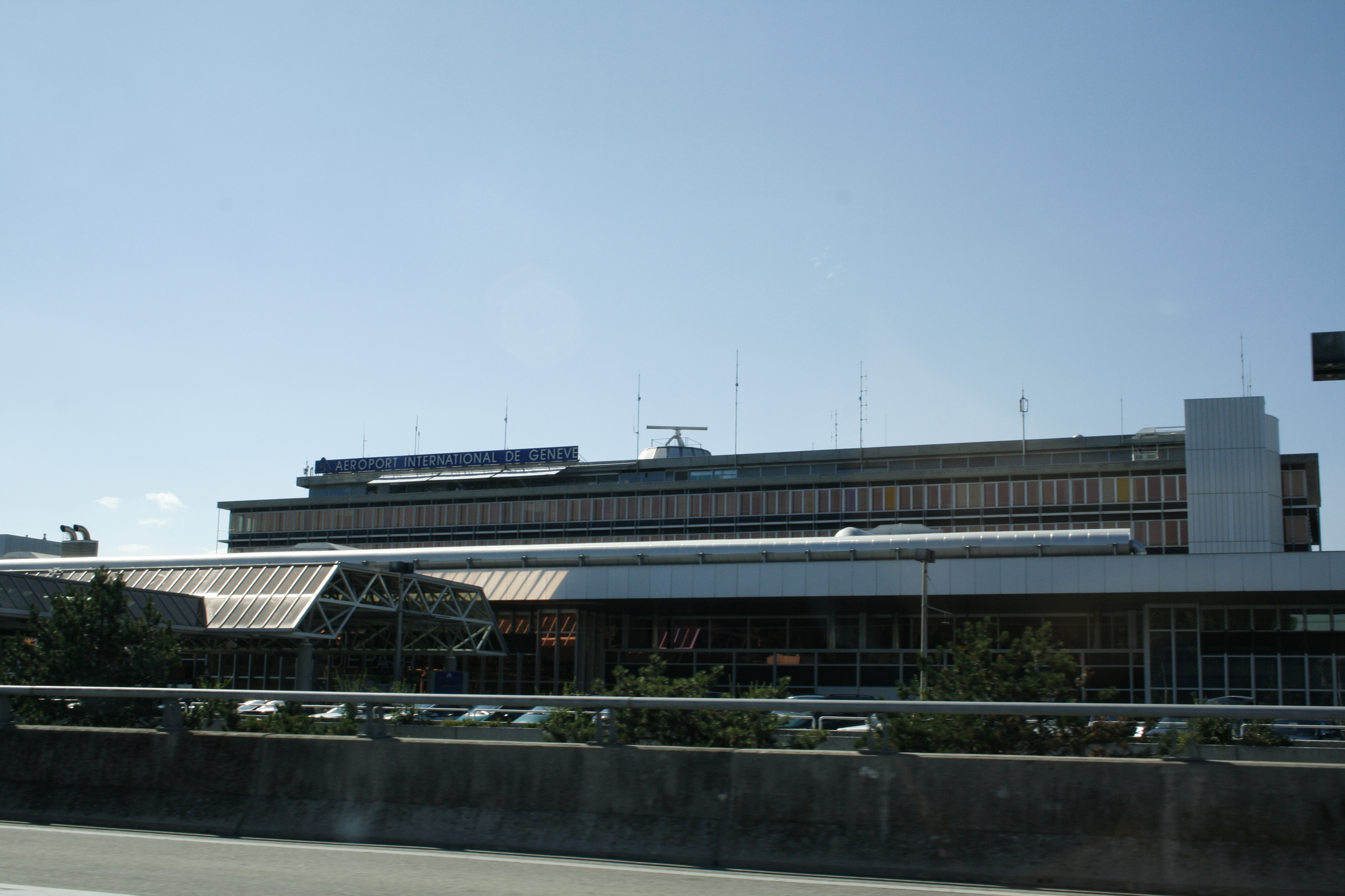 Eingangsgebäude des Internationalen Flughafen Genf.